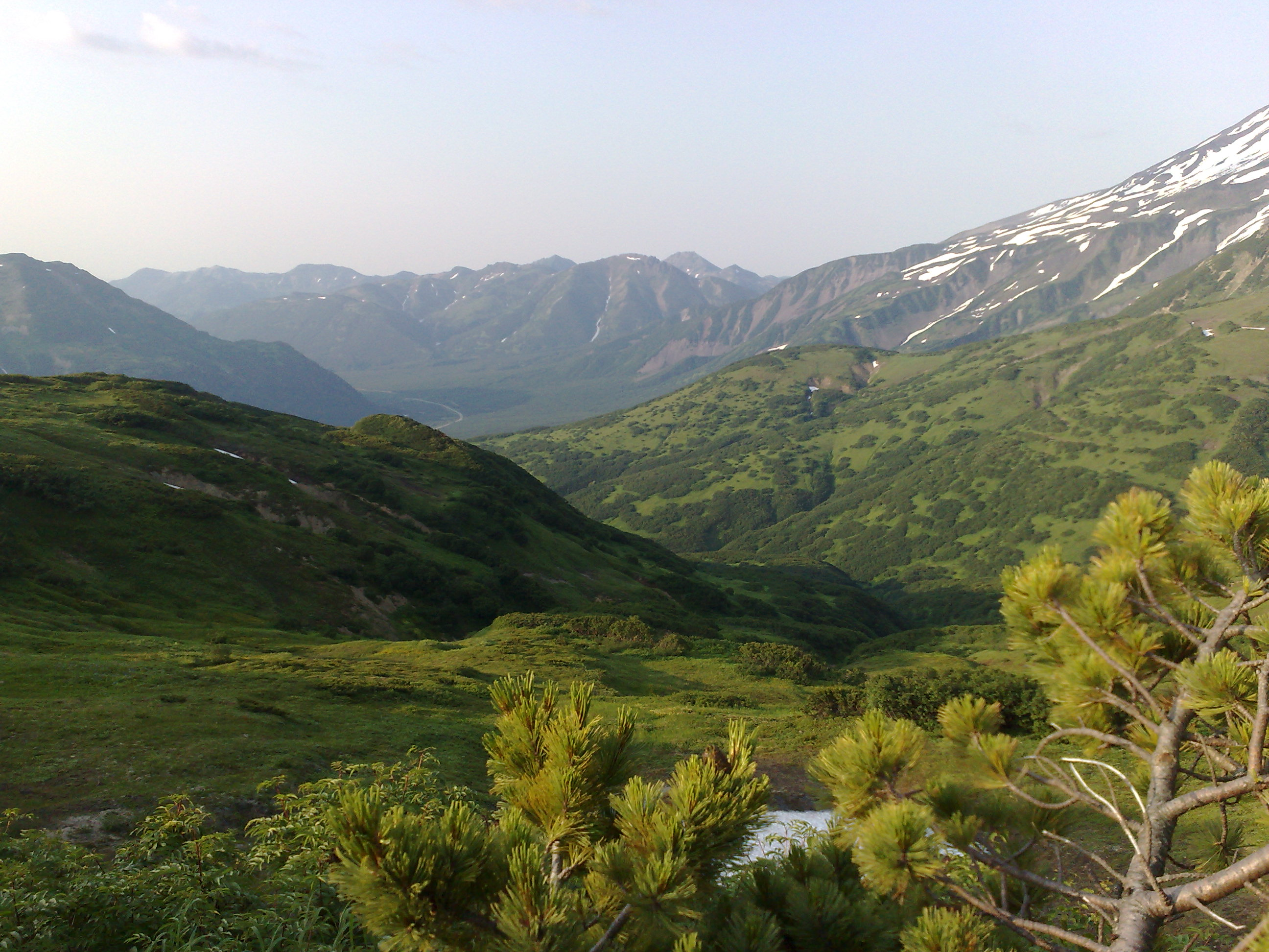 road to Mutnovskiy